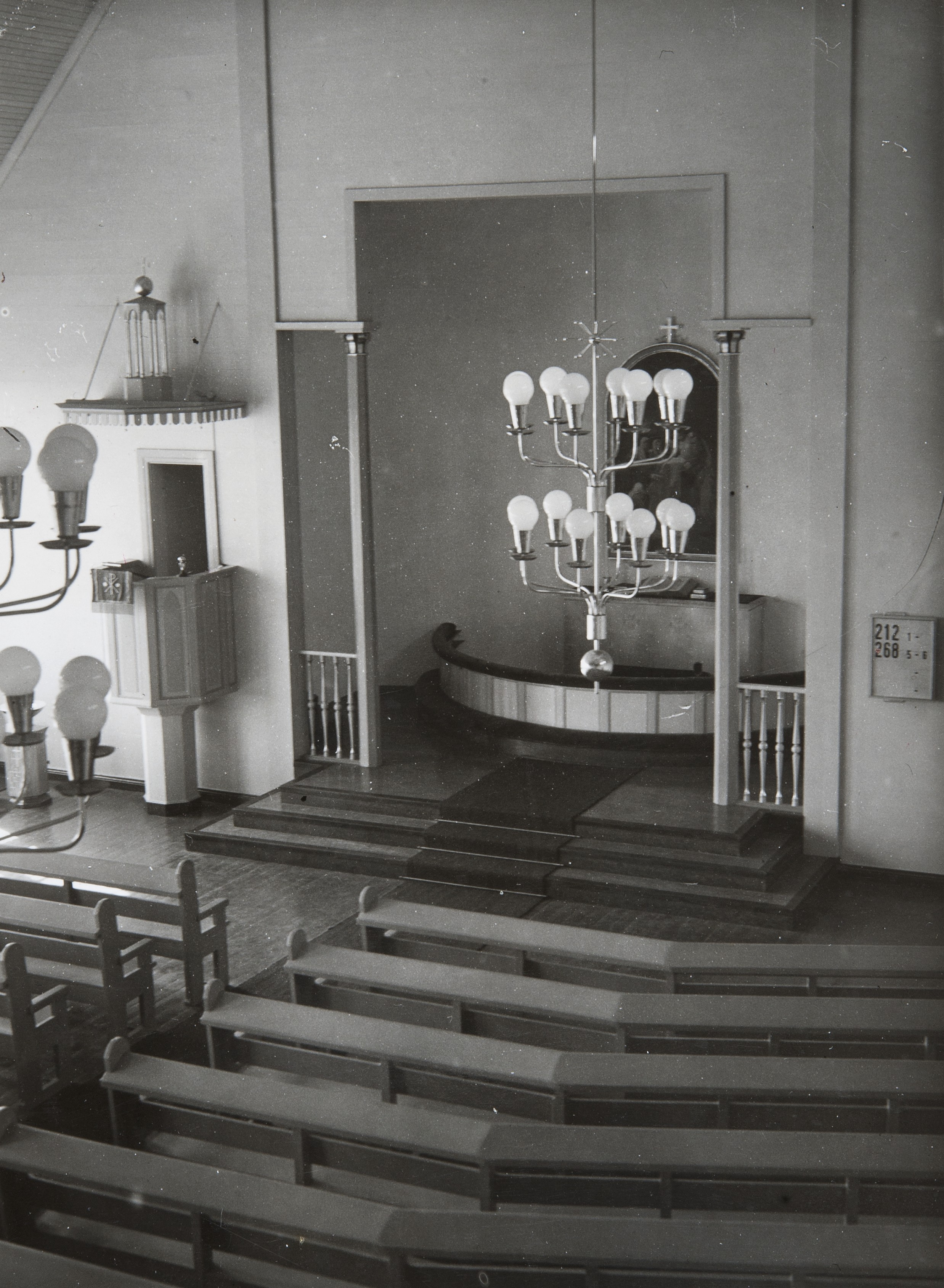 Pispalan kirkko Tampereella 1950-luvulla, sisäkuva. Kirkko paloi vuonna 1968. Taustalla näkyvät virren numerot (212 ja 268) ovat vuoden 1986 virsikirjassa virret 409 ja 284.